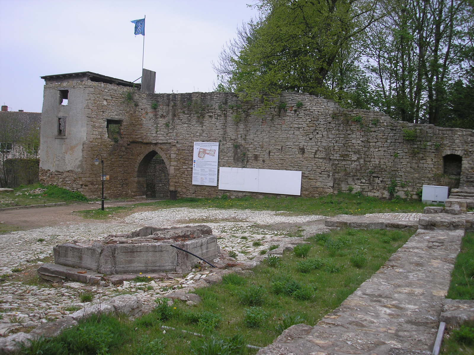 Ruine des Schlosses in Ebeleben (Thüringen).